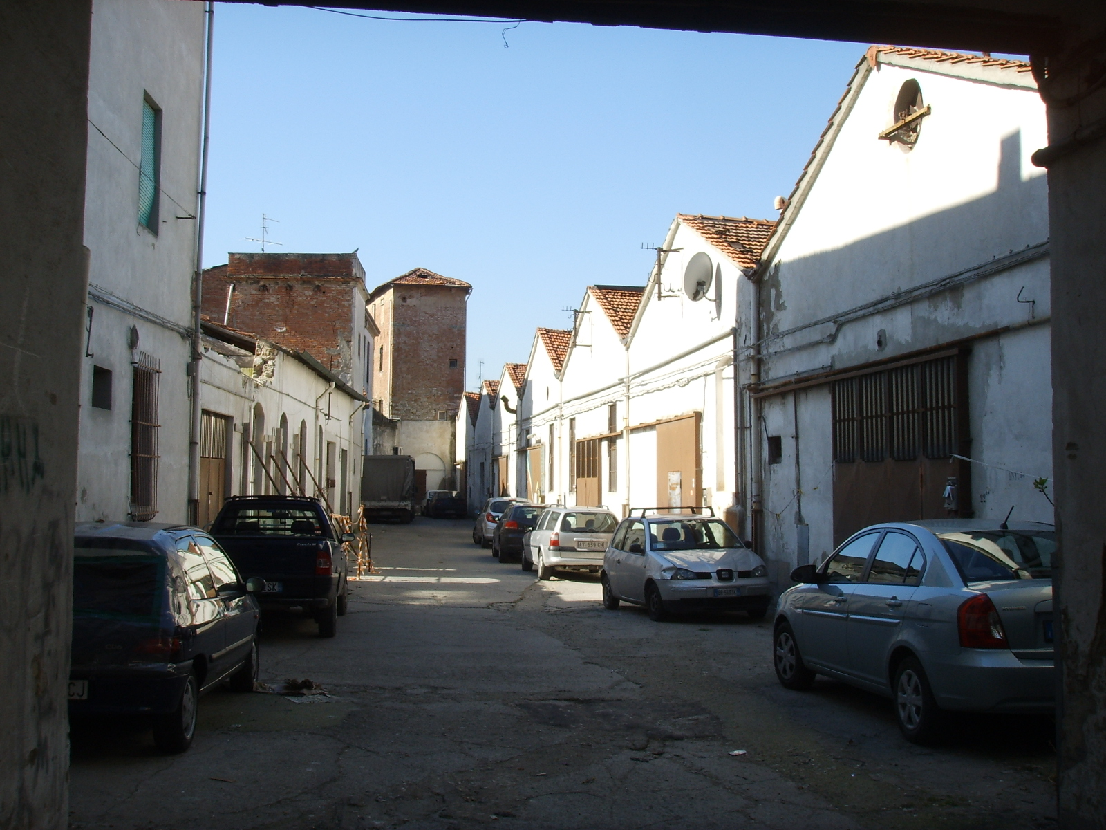 Prato, archeologia industriale